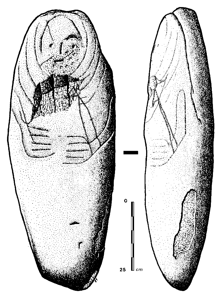 Ídolo-estela de Agallas (provincia de Salamanca, España)